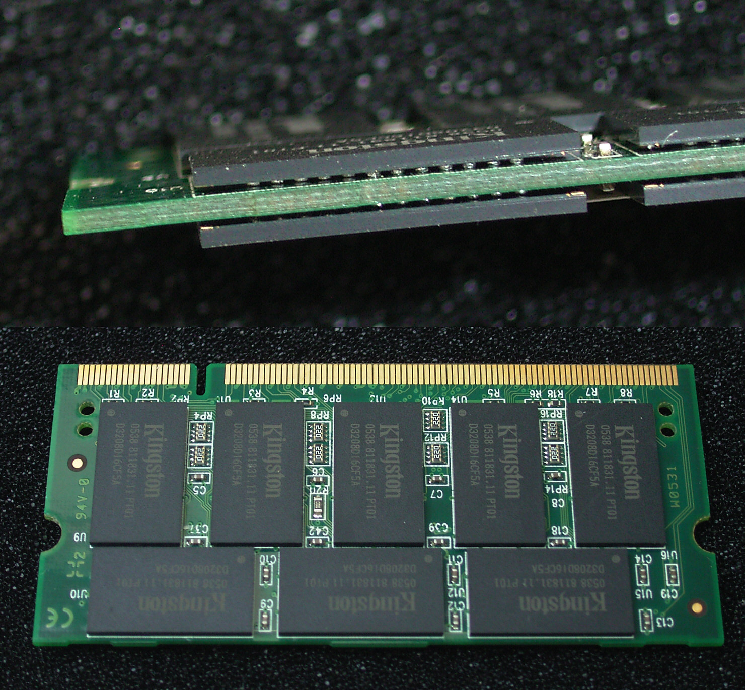 Kingston SO-DIMM beidseitig mit RAM-Chips in BGA-Technik bestückt